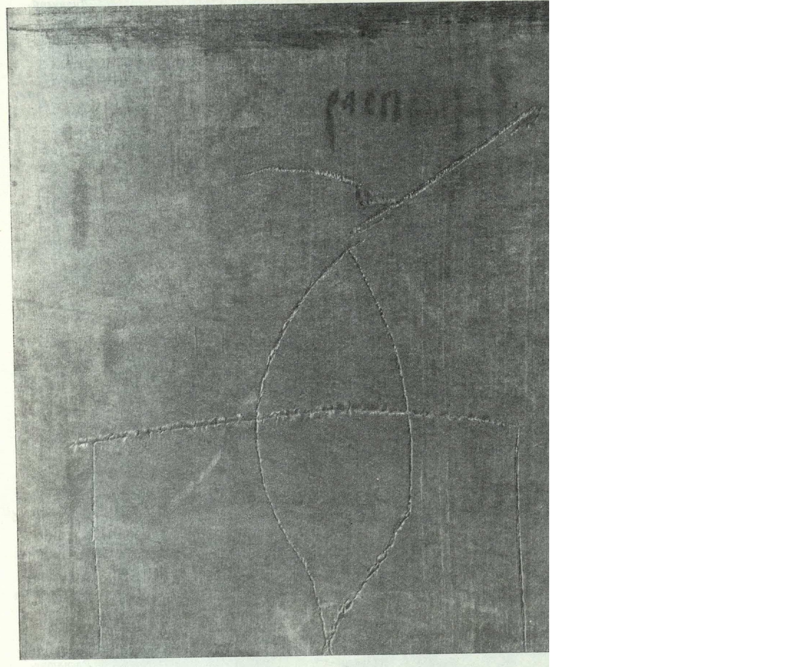 Надписи на обороте иконы Дионисия "Распятие" из Павло-Обнорского монастыря